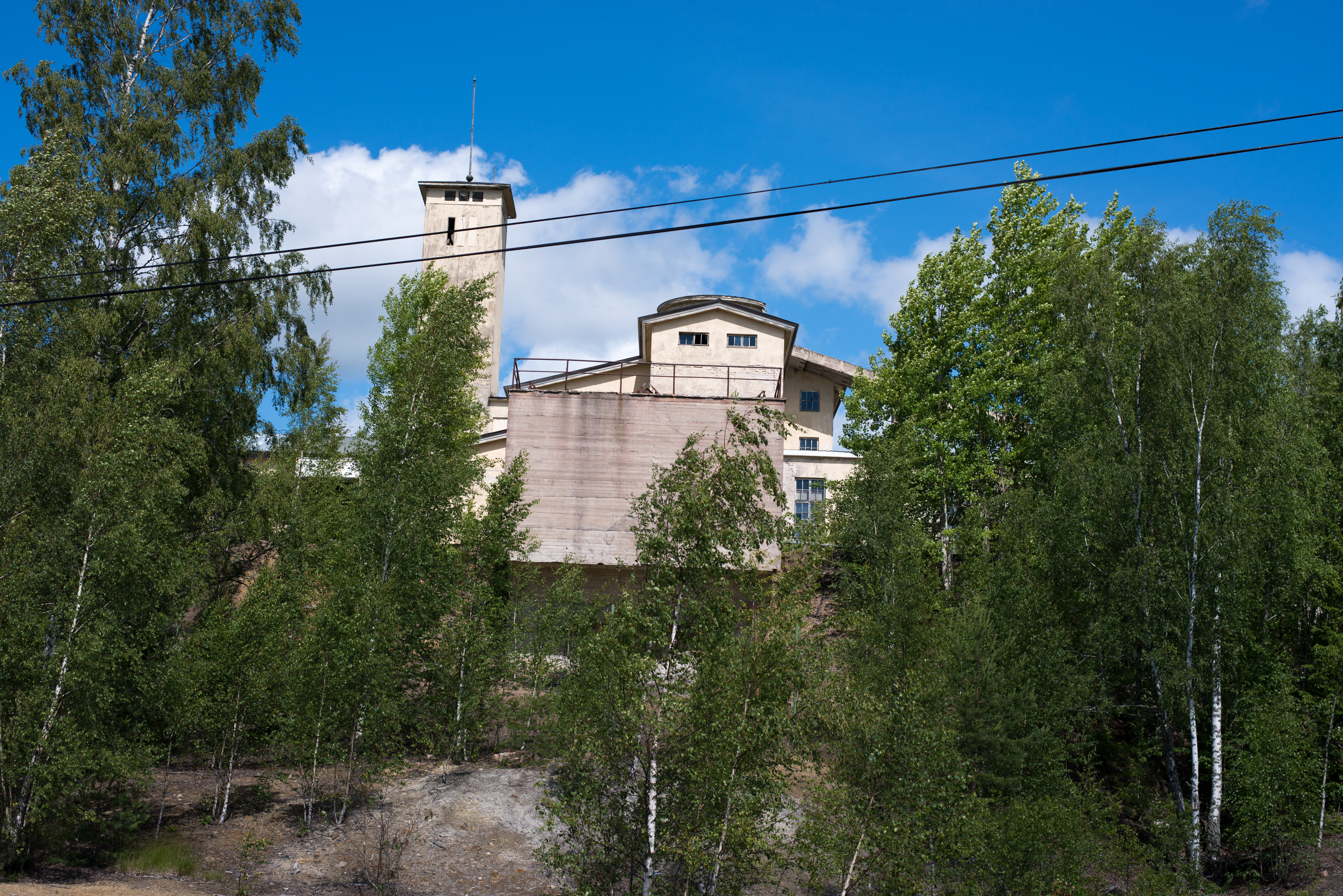 Aijalan kaivos Kiskossa